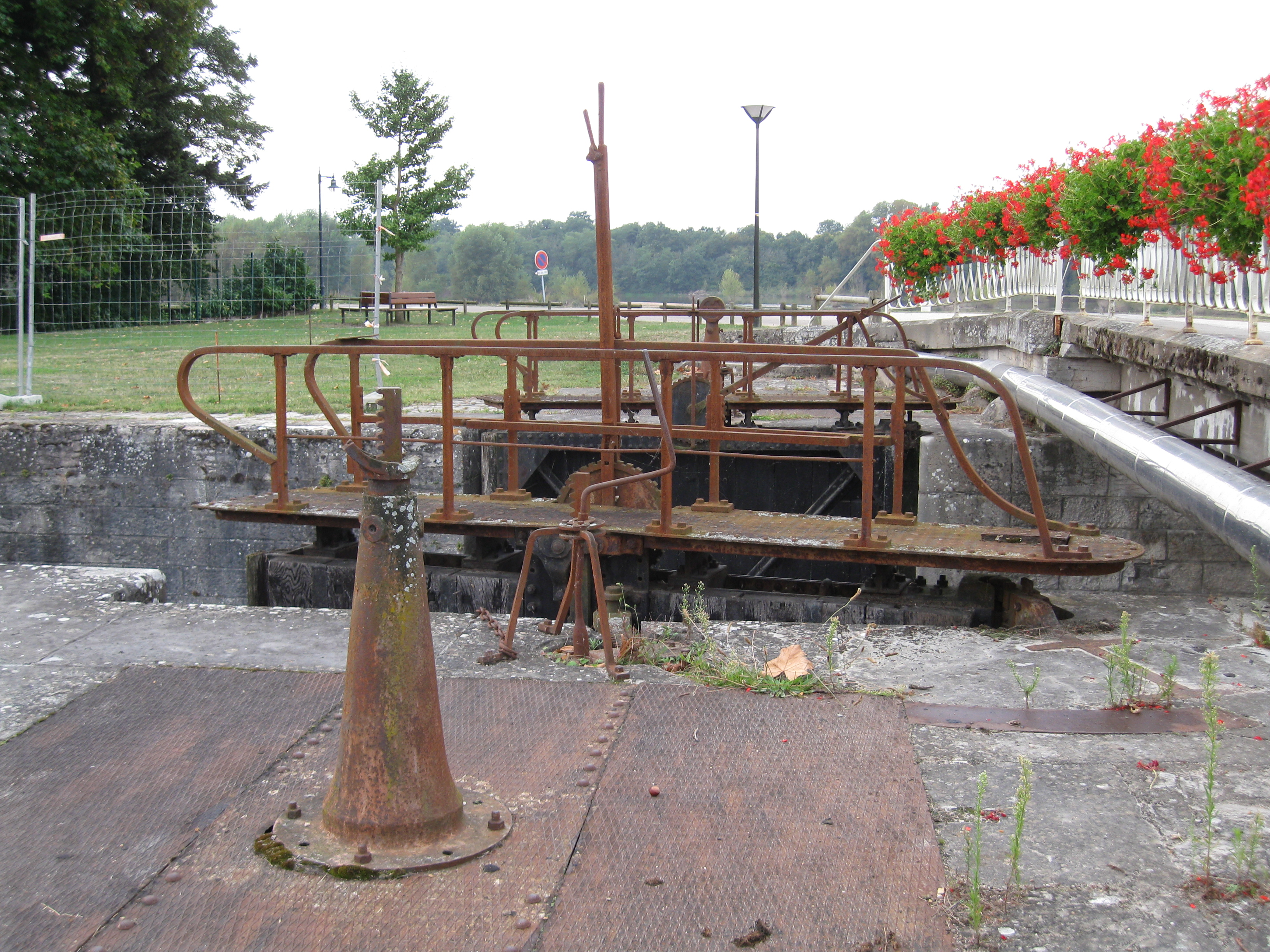 L'écluse de l'Embouchure sur le canal d'Orléans, Combleux, Loiret, France